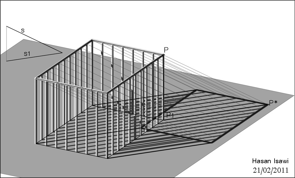 Ombre prodotte da una sorgente impropria e' una proiezione parallela (assonometria). Ponendo il centro di proiezione in modo che sia coincidente con la direzione sorgente luminosa S, l'immagine proiettata coinciderebbe con la stessa ombra prodotta dalla sorente s. Nel caso mostrato in figura, l'ombra e' una assonometria cavaliera militare. In cui la prima proiezione s1 della sorgente s e' parallela all'immagine delle rette verticali. Per esempio La prima proiezione P1 del punto P coincide con la traccia di una retta verticale z passante per P. l'immagine z' di z e' parallela ad s1.